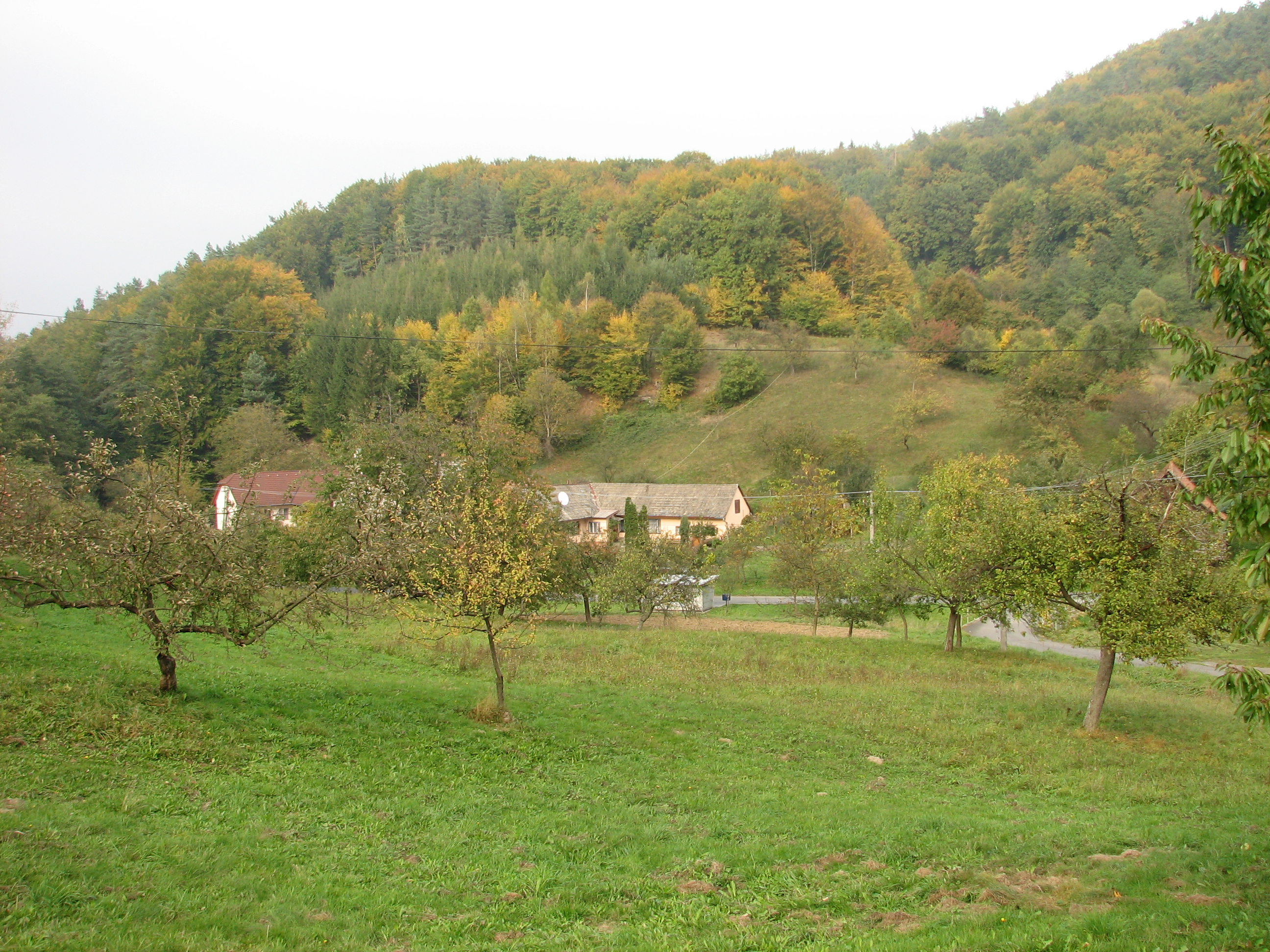 Pradlisko